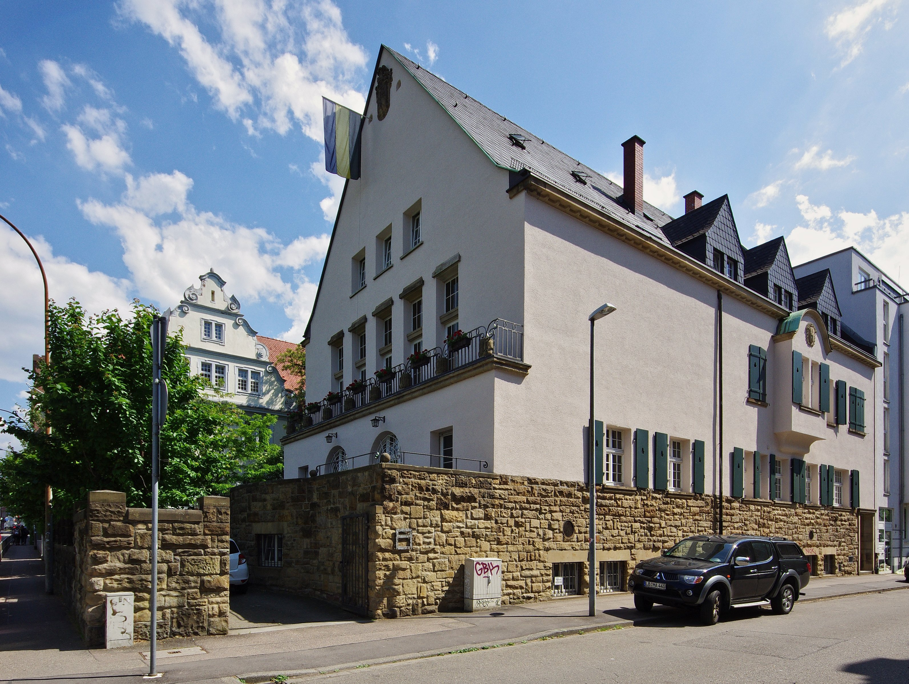 Verbindungshaus des Corps Suevia Freiburg, Lessingstraße 14; erbaut 1909-1910 nach Entwurf von Hermann Billing; nach 1945 vorübergehend Sitz der Oberpostdirektion Freiburg; seit 1985 unter Denkmalschutz